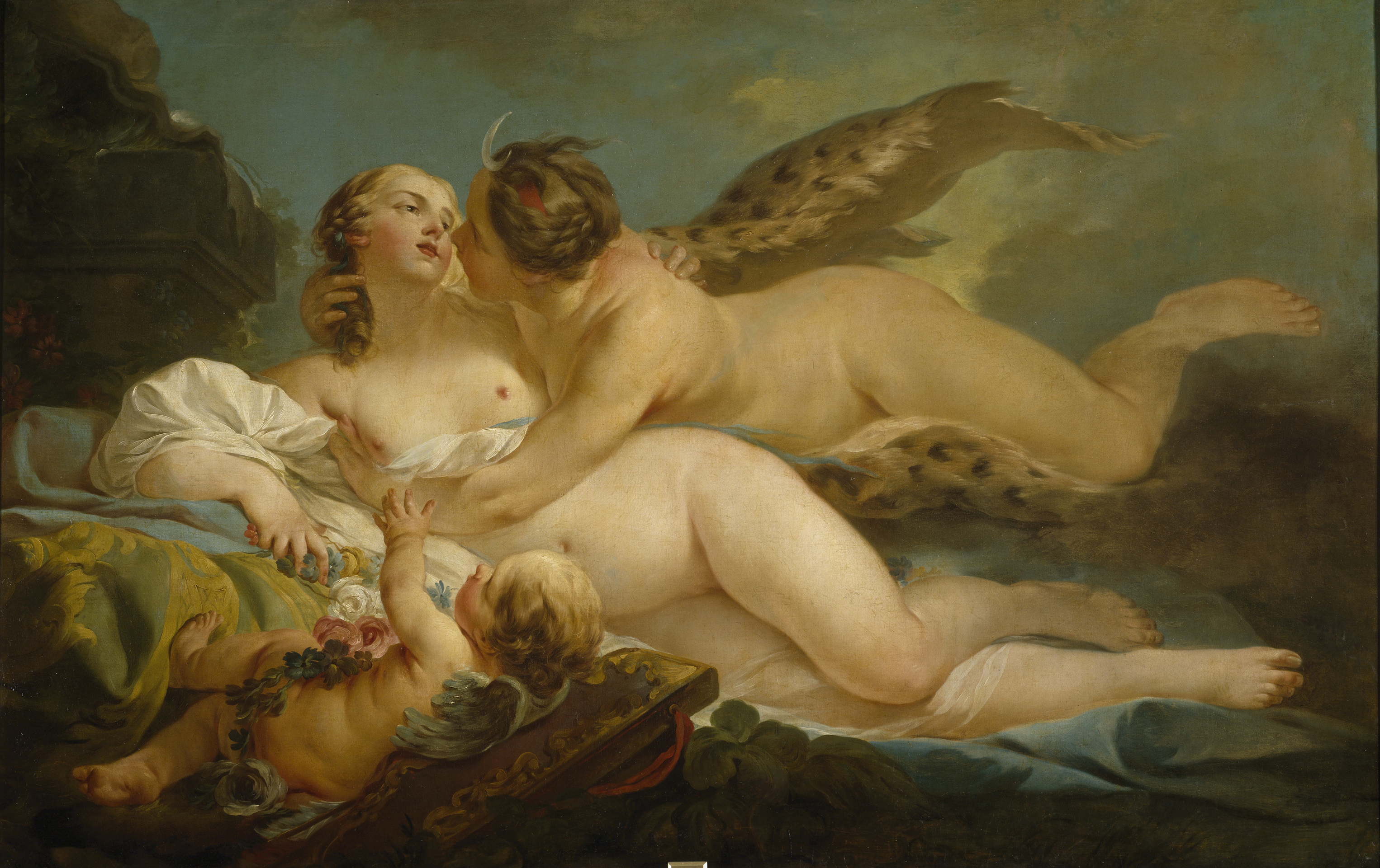 Escena narrada por Ovidio (Metamorfosis, libro II) que muestra el engaño del dios Júpiter a la ninfa Calisto. Ninfa de gran belleza y miembro del séquito de Diana, diosa de la caza, fue seducida por Júpiter quien para ello tomó las facciones de Diana. Embarazada, la ninfa intentará ocultar su estado a la diosa quien, virgen ella, obligaba a sus acompañantes a mantenerse célibes. Júpiter convirtió a su amante en osa para librarla del castigo pero, descubriendo el engaño, Diana la abatió a flechazos. A su muerte, Calisto fue llevada al cielo por Júpiter, quien la colocó entre las constelaciones recibiendo el nombre de Osa Mayor. Pierre representa el momento del engaño inicial, cuando Calisto se abandona en los brazos de Júpiter disfrazado de Diana. Para distinguirlas, la diosa aparece tocada con su símbolo, la media luna. Junto a ellas juega un amorcillo que se apoya sobre el carcaj de flechas de la diosa de la caza. Esta obra es compañera de Júpiter y Antíope (P03218).